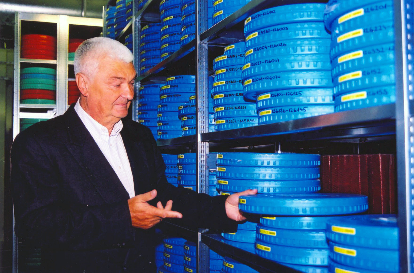 Filmski arhiv